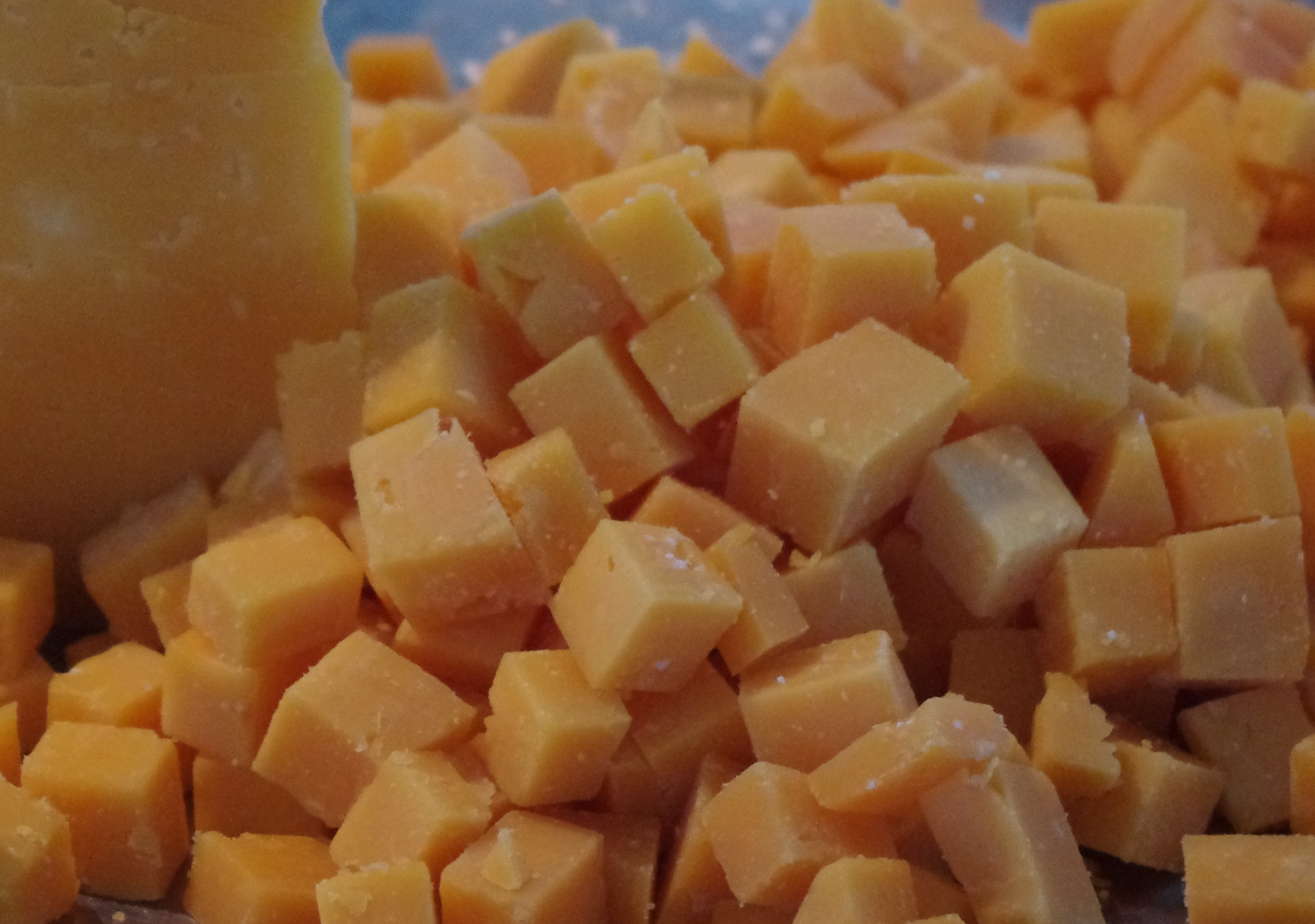 Čedaras siers